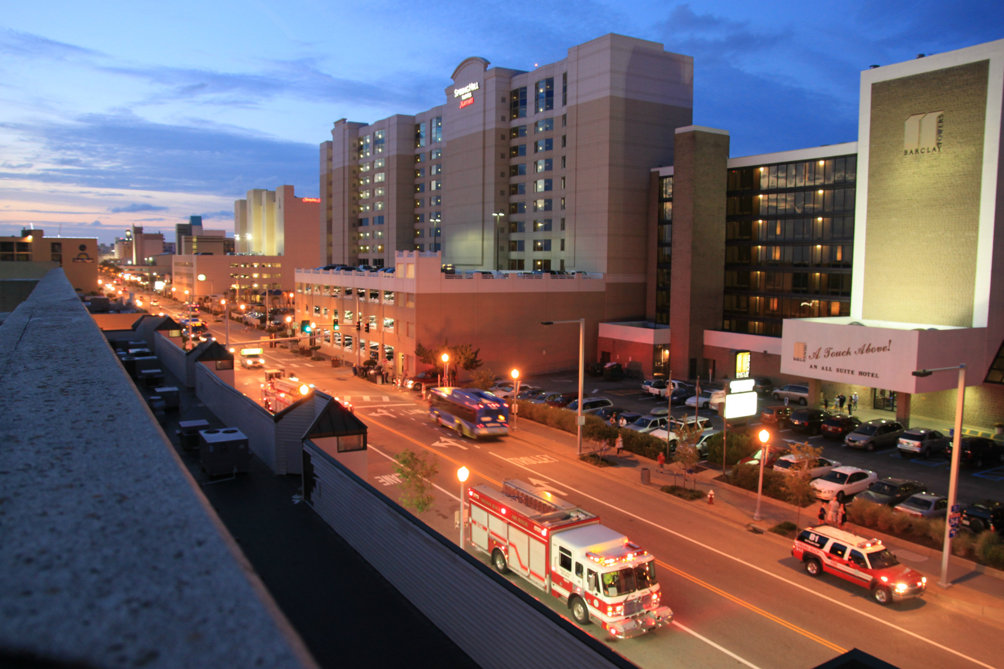 Virginia Beach